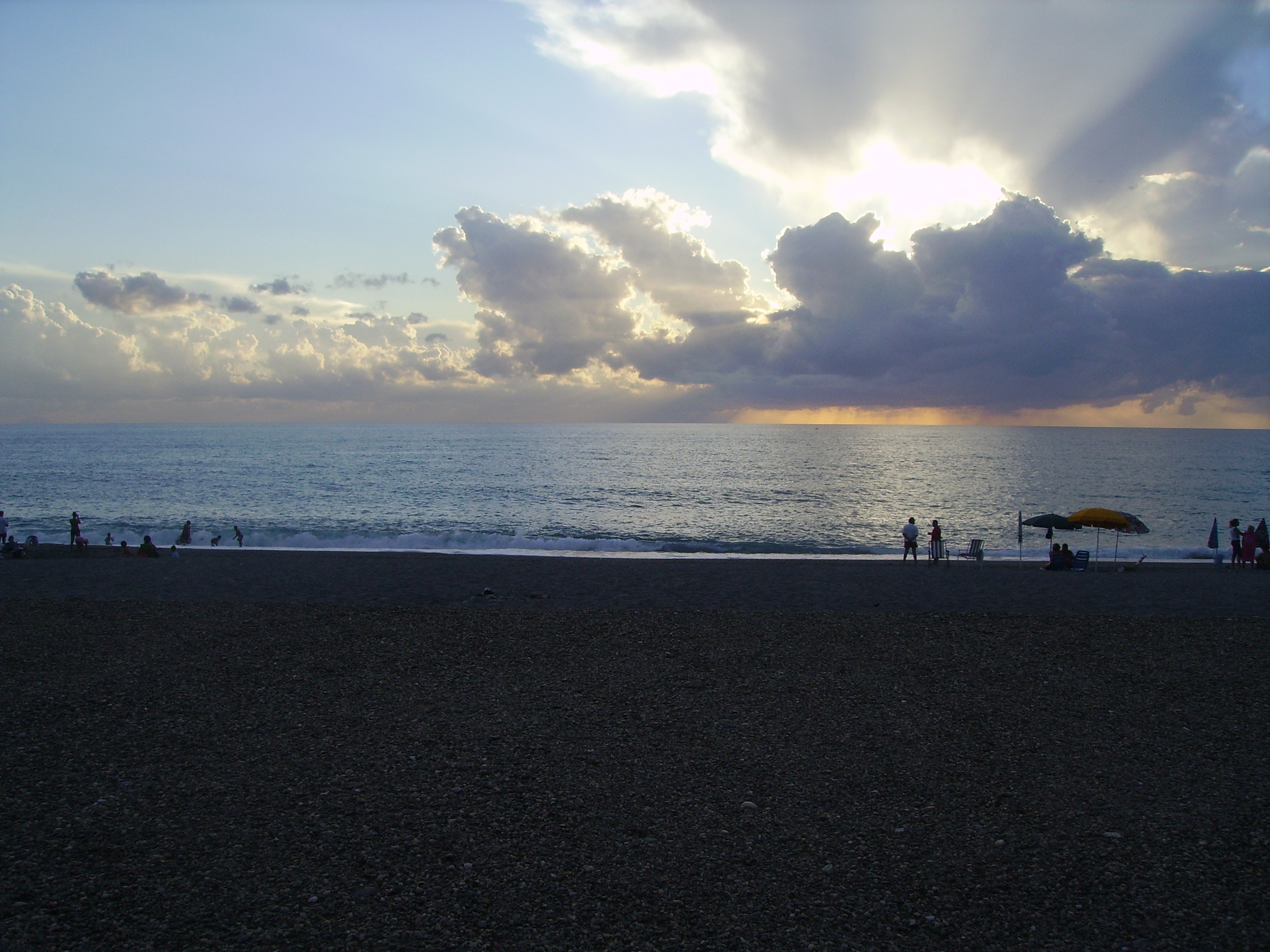 Mare di Amantea al tramonto